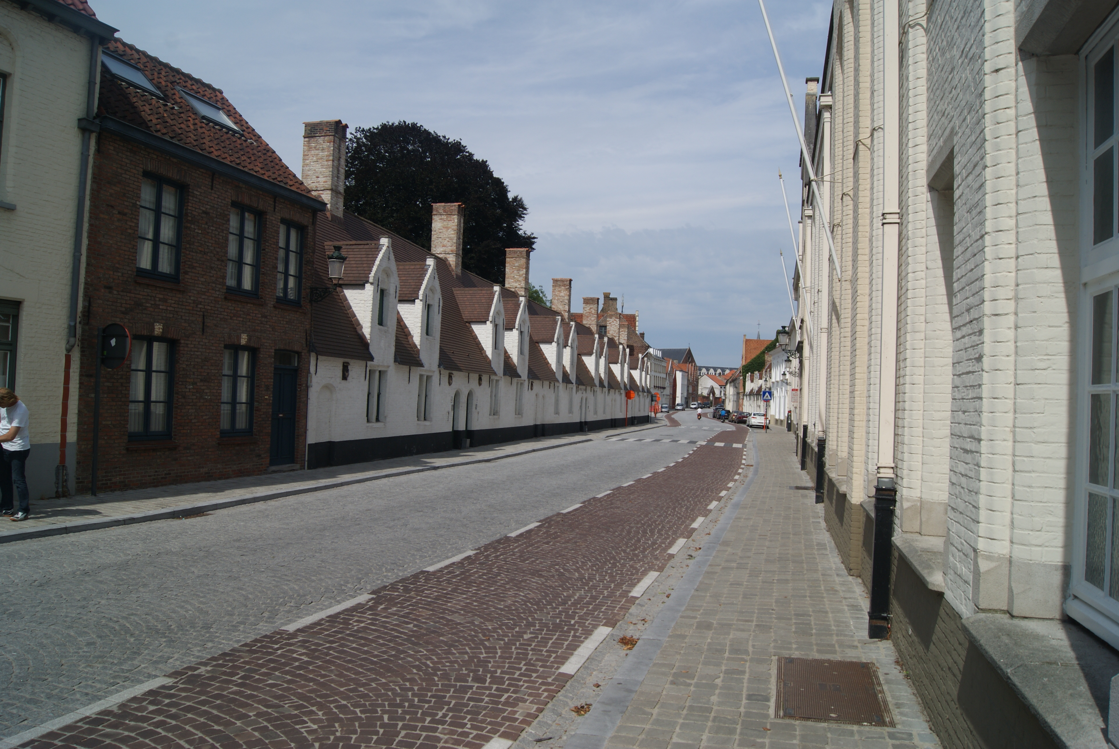 Godshuis - De Moor - Boeveriestraat 52-62